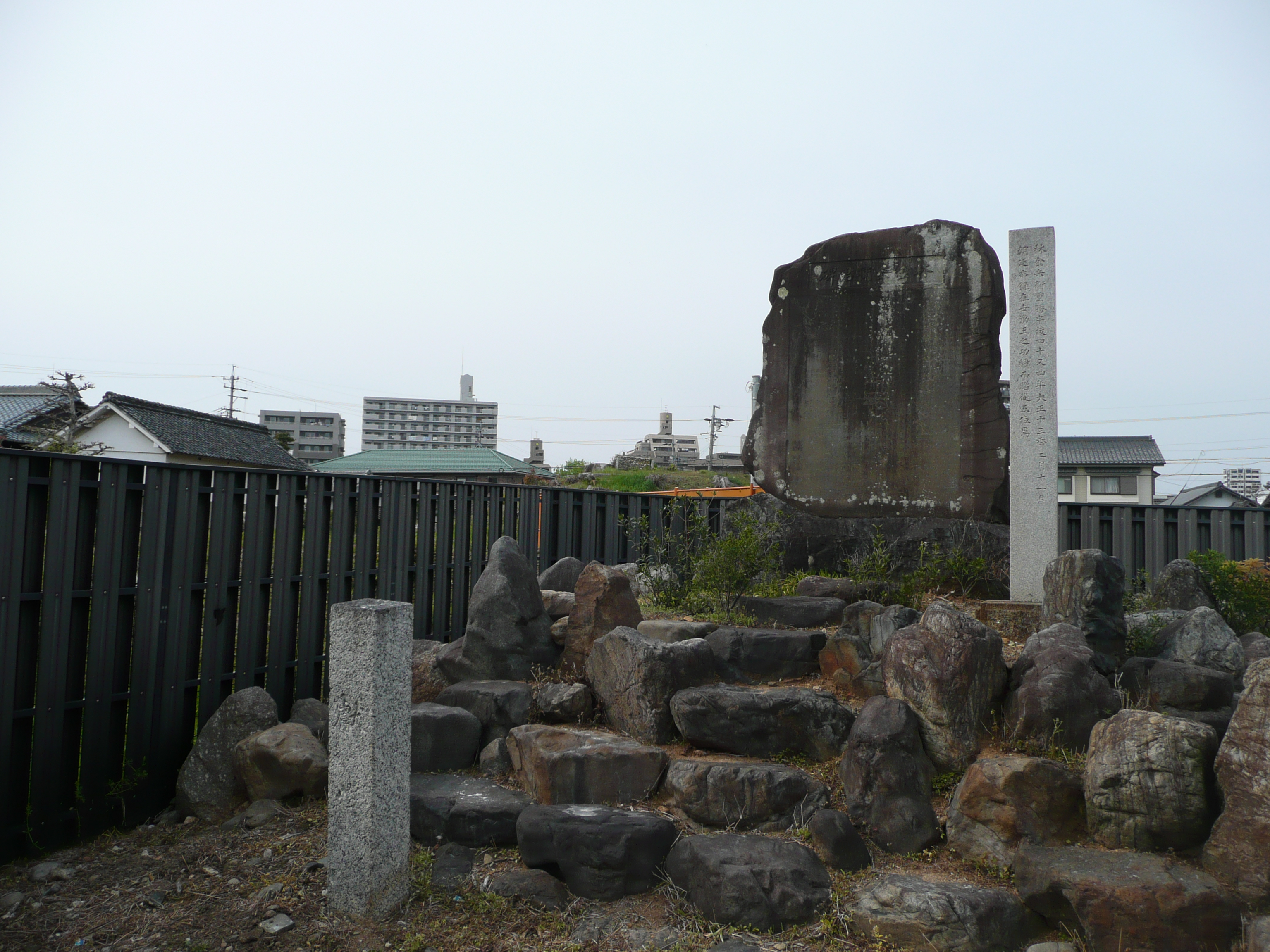 上条城の脇にある林家屋敷跡と石碑。